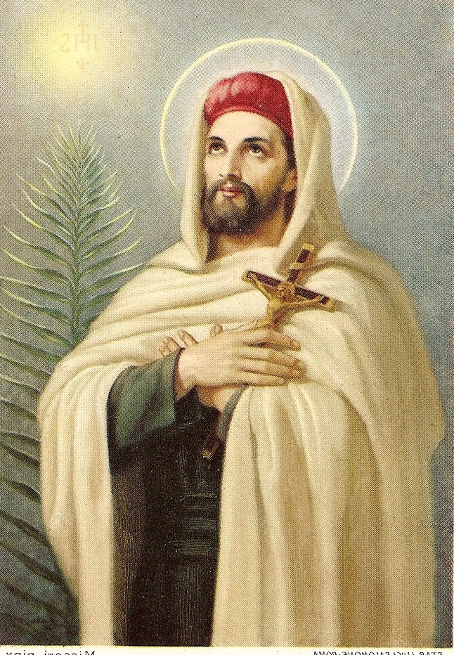 St. John De Britto